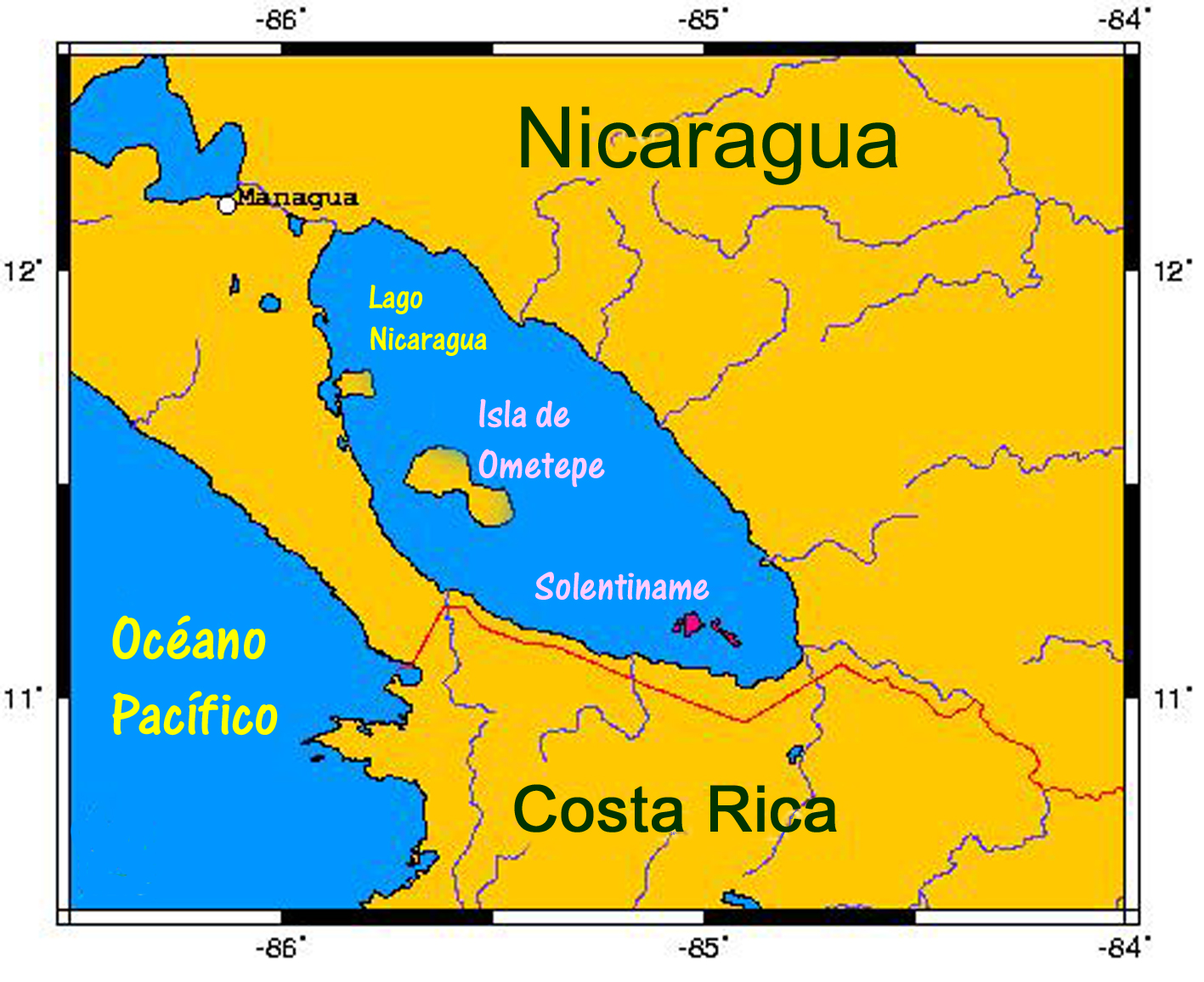 Ubicación de la isla de Ometepe y del Archipiélago de Solentiname en el lago Nicaragua Versión "traducida" del mapa creado por Kelisi